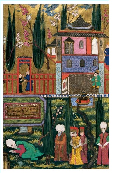 Kanunî Sultan Süleyman’ın isyan eden oğlu Şehzade Bayezid’e beddua etmesi